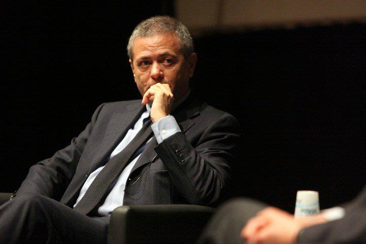 Ezio Mauro ijf10